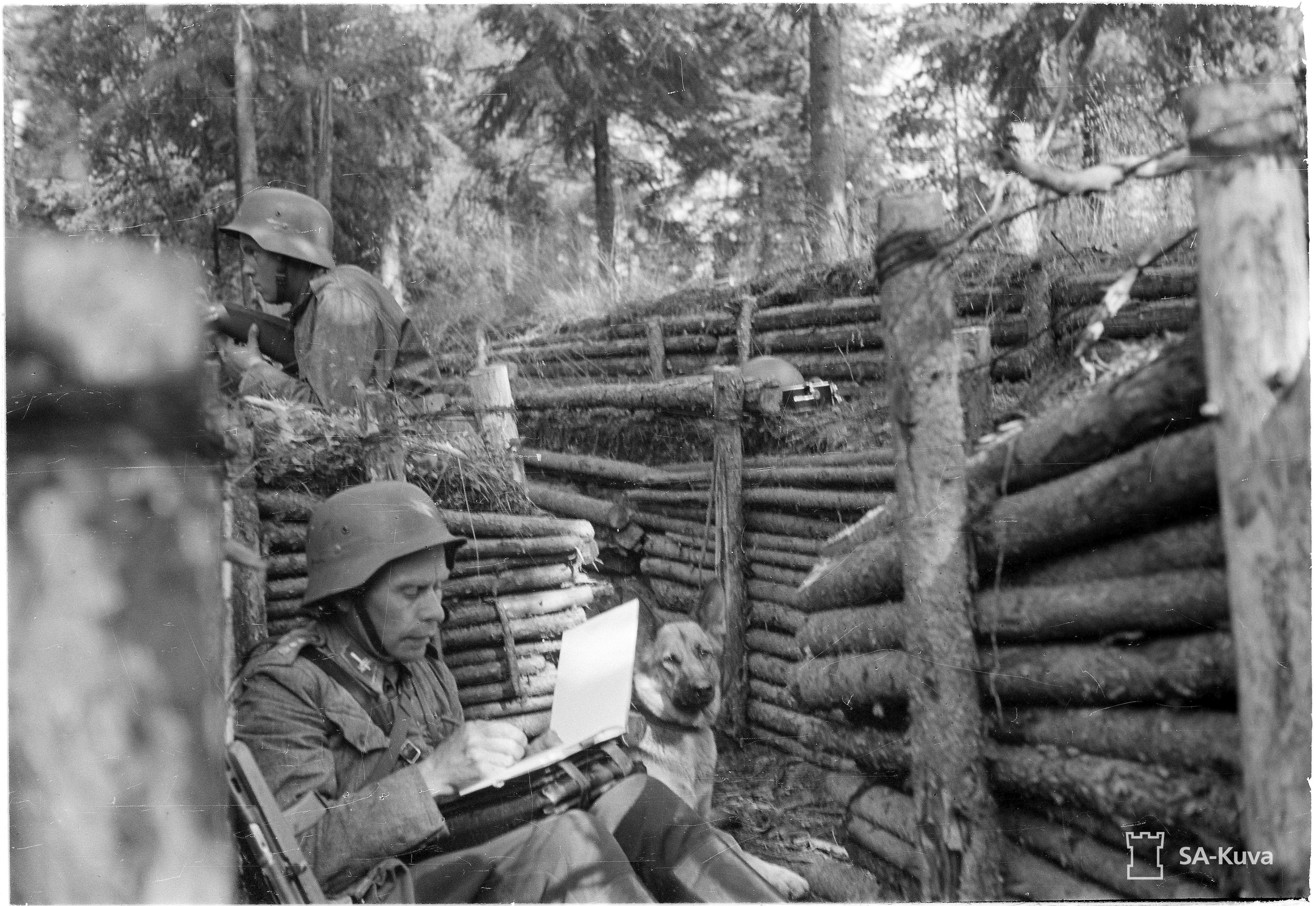 TK-taiteilija Aukusti Tuhka piirtää luonnoksia eturintamassa